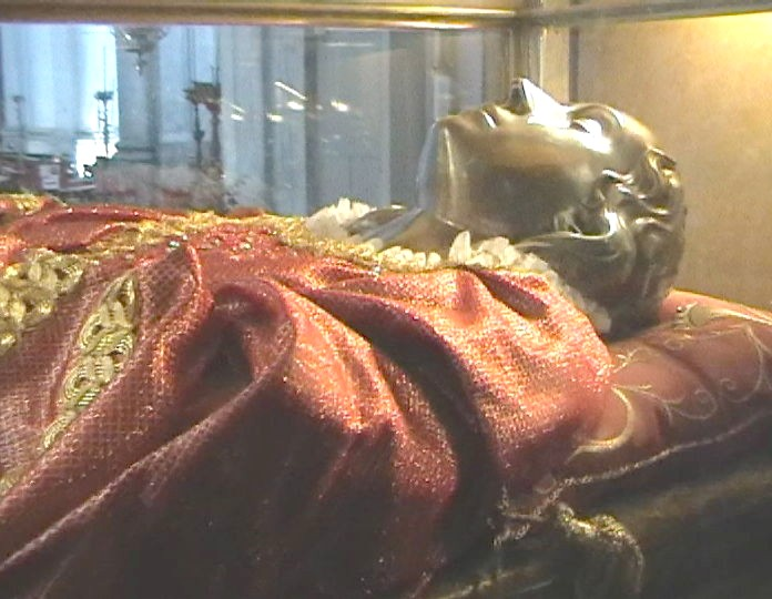 corpo di Santa Lucia.